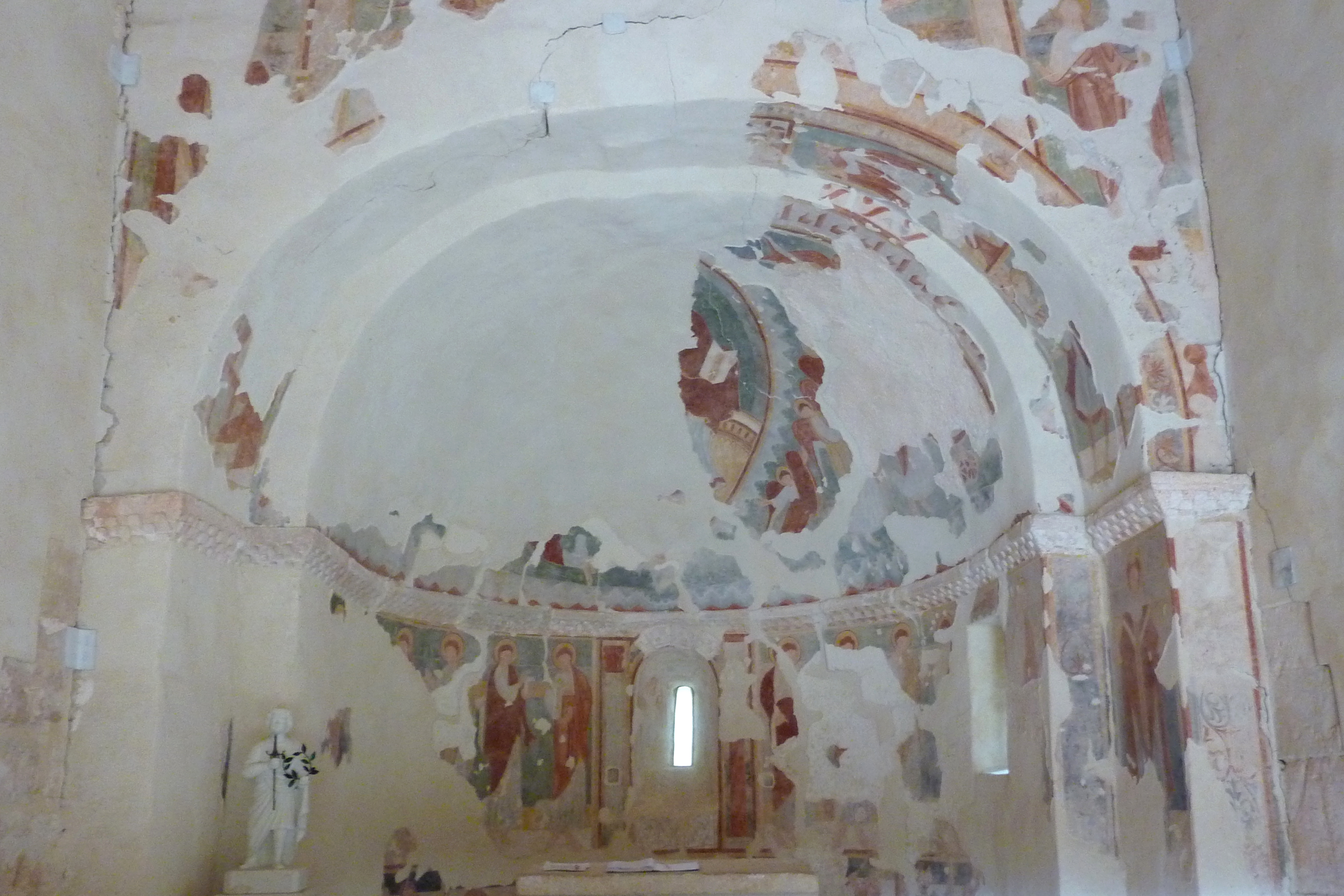 Ermita de San Pelayo in Perazancas de Ojeda, einem Ortsteil von Cervera de Pisuerga in der Provinz Palencia (Kastilien-León/Spanien), Apsis mit Wand- und Deckenmalerei aus dem 12. Jahrhundert